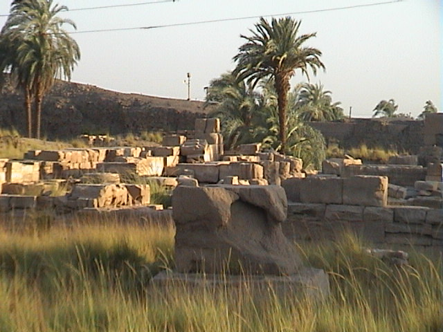 Vue des ruines du temple de Montou à Karnak - août 2004